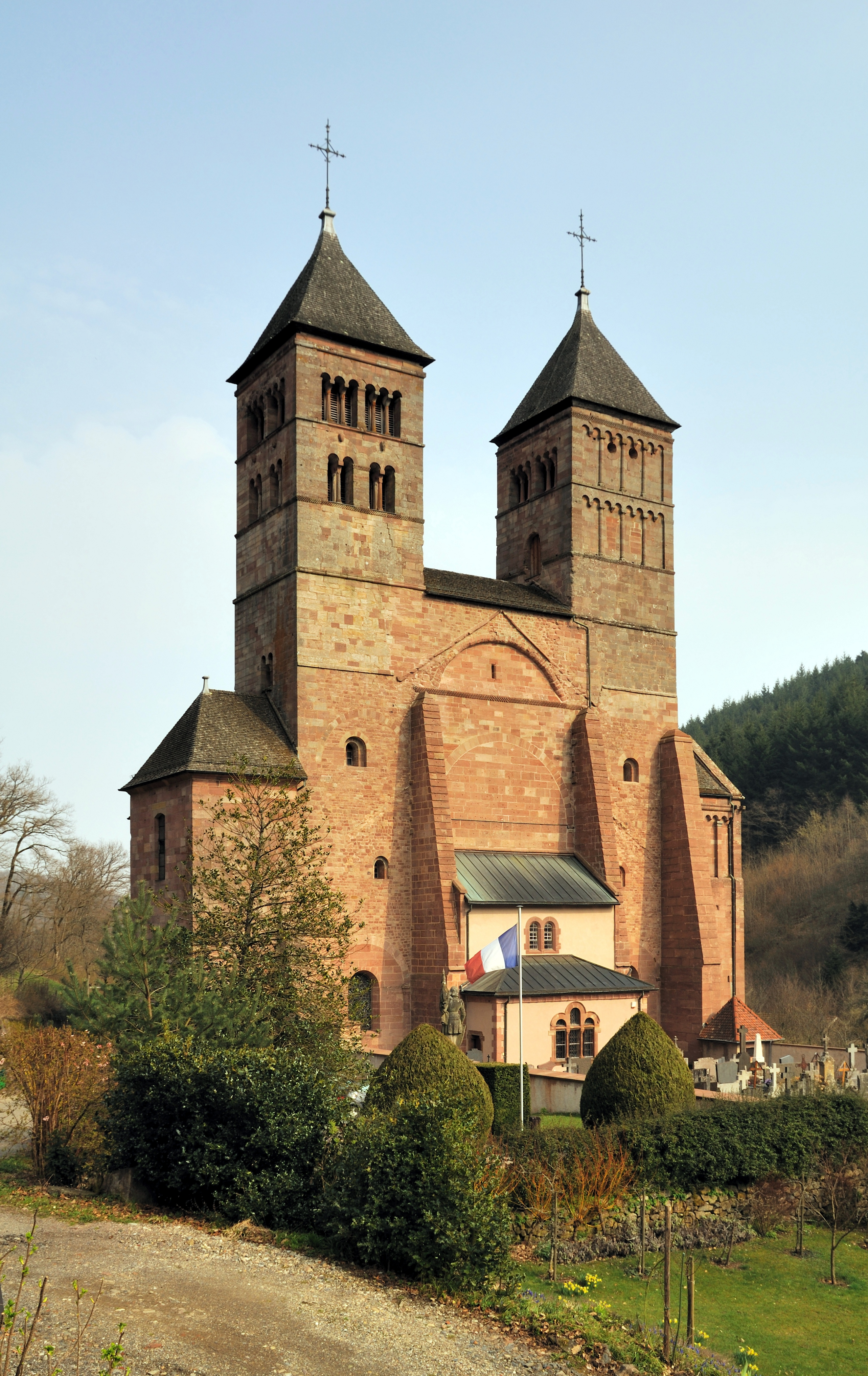 Abteikirche Murbach